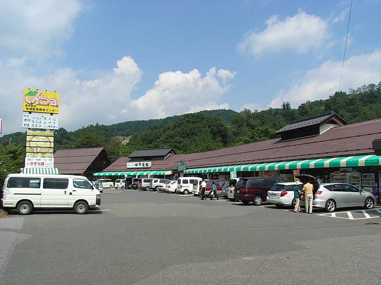 Michinoeki Shinshushinmachi (Nagano)(道の駅信州新町)